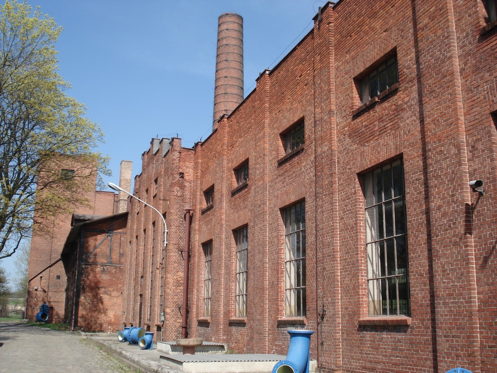 Zabytkowa Stacja Wodociągowa Karchowice Obiekt na Szlaku Zabytków Techniki Województwa Śląskiego